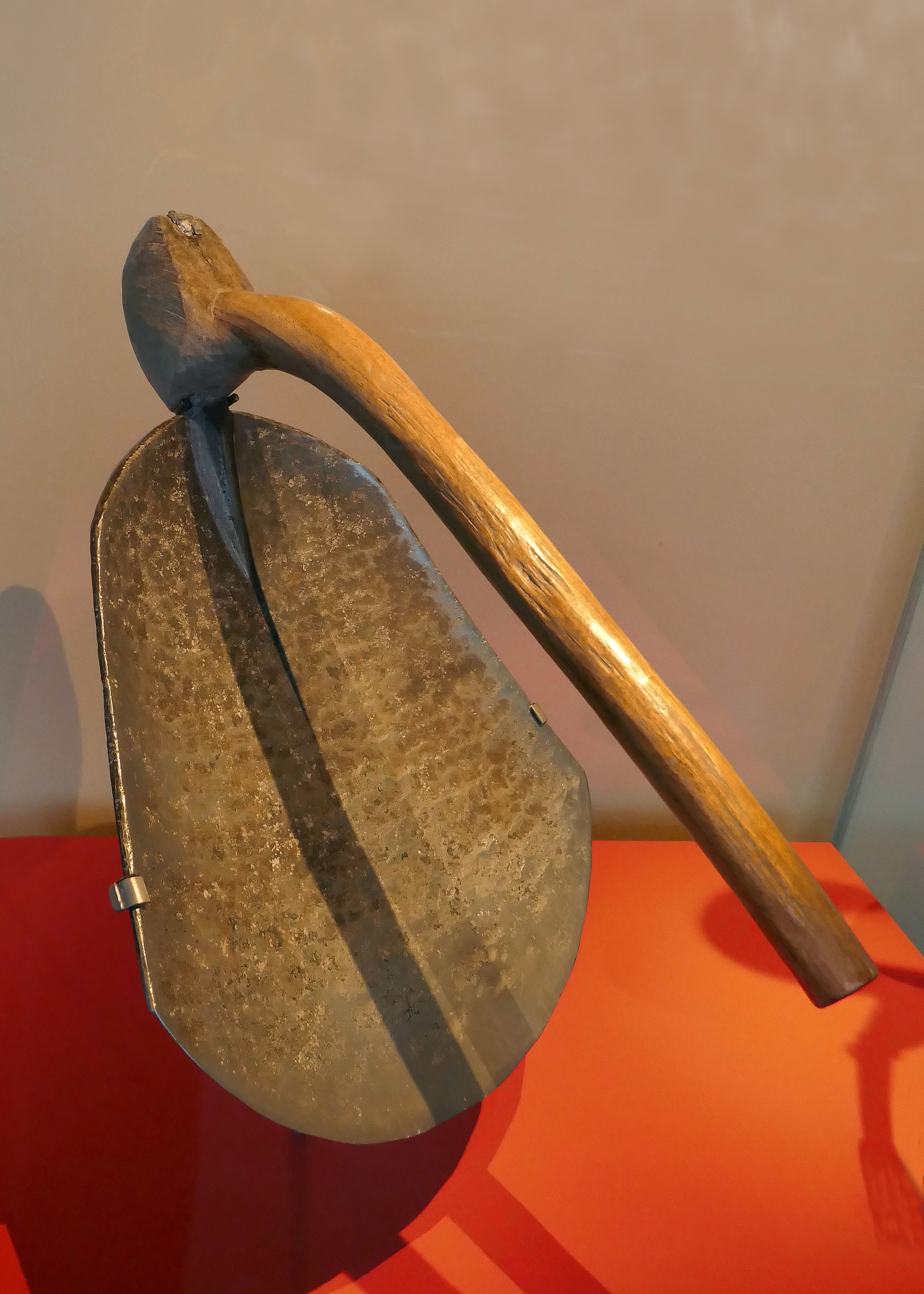 Houe à manche court Artiste inconnu Population Sénoufo, Burkina Faso, vers 2010 Fer, bois Collection privée Objet présenté lors de l'exposition Frapper le fer. L'art des forgerons africains au musée du quai Branly Jacques Chirac.